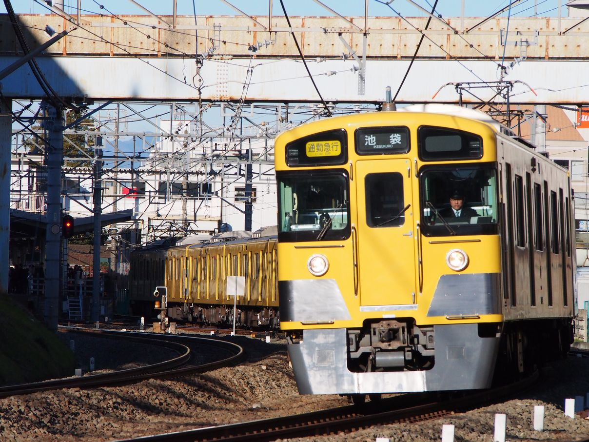 通勤急行池袋行